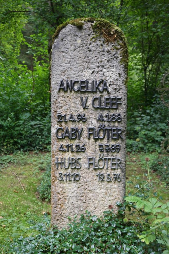 Grab des Bildjournalisten und Modefotografen Hubs Flöter, 1910-1976, auf dem Waldfriedhof in München-Solln